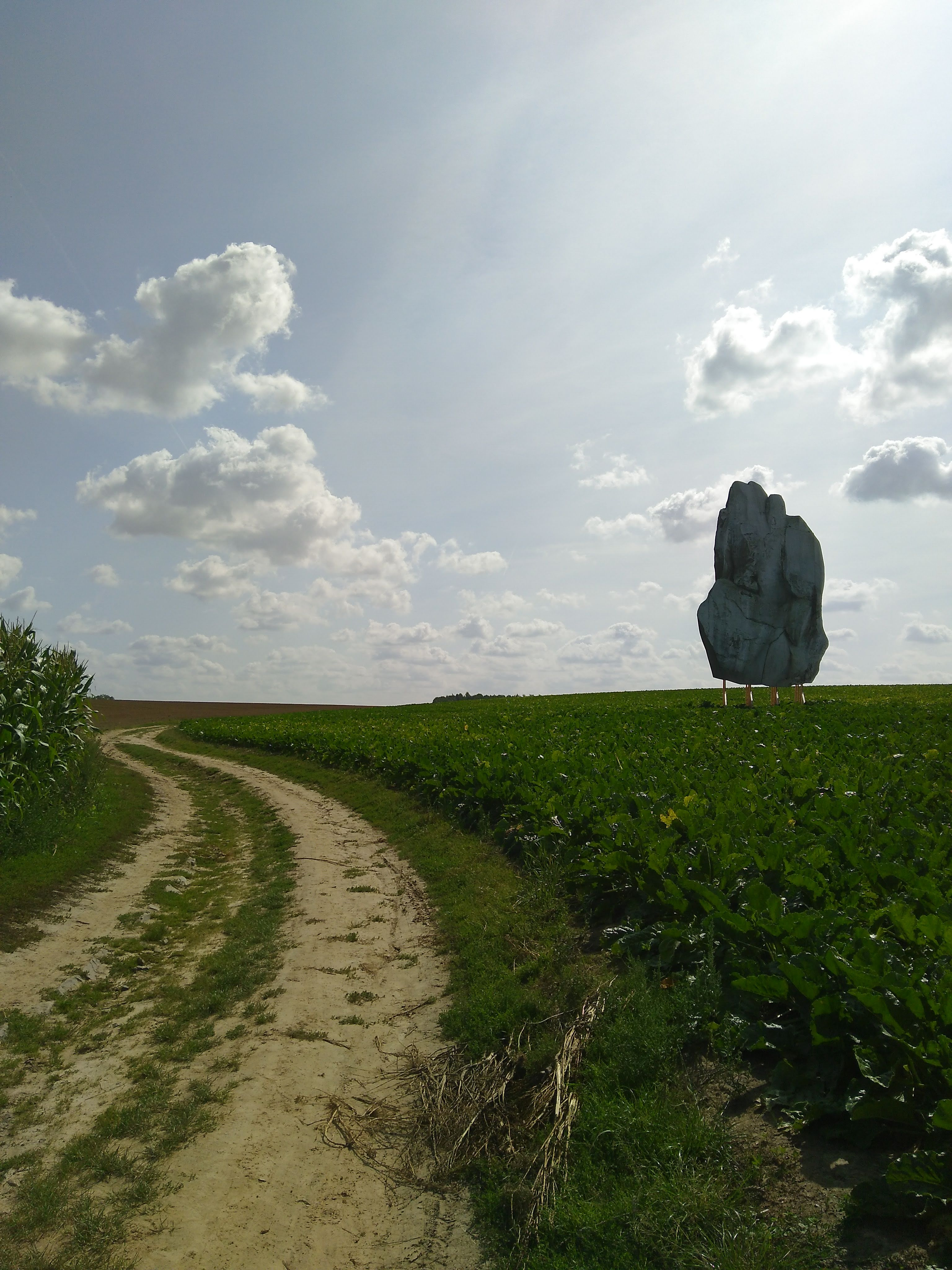 Werk van Filip Dujardin